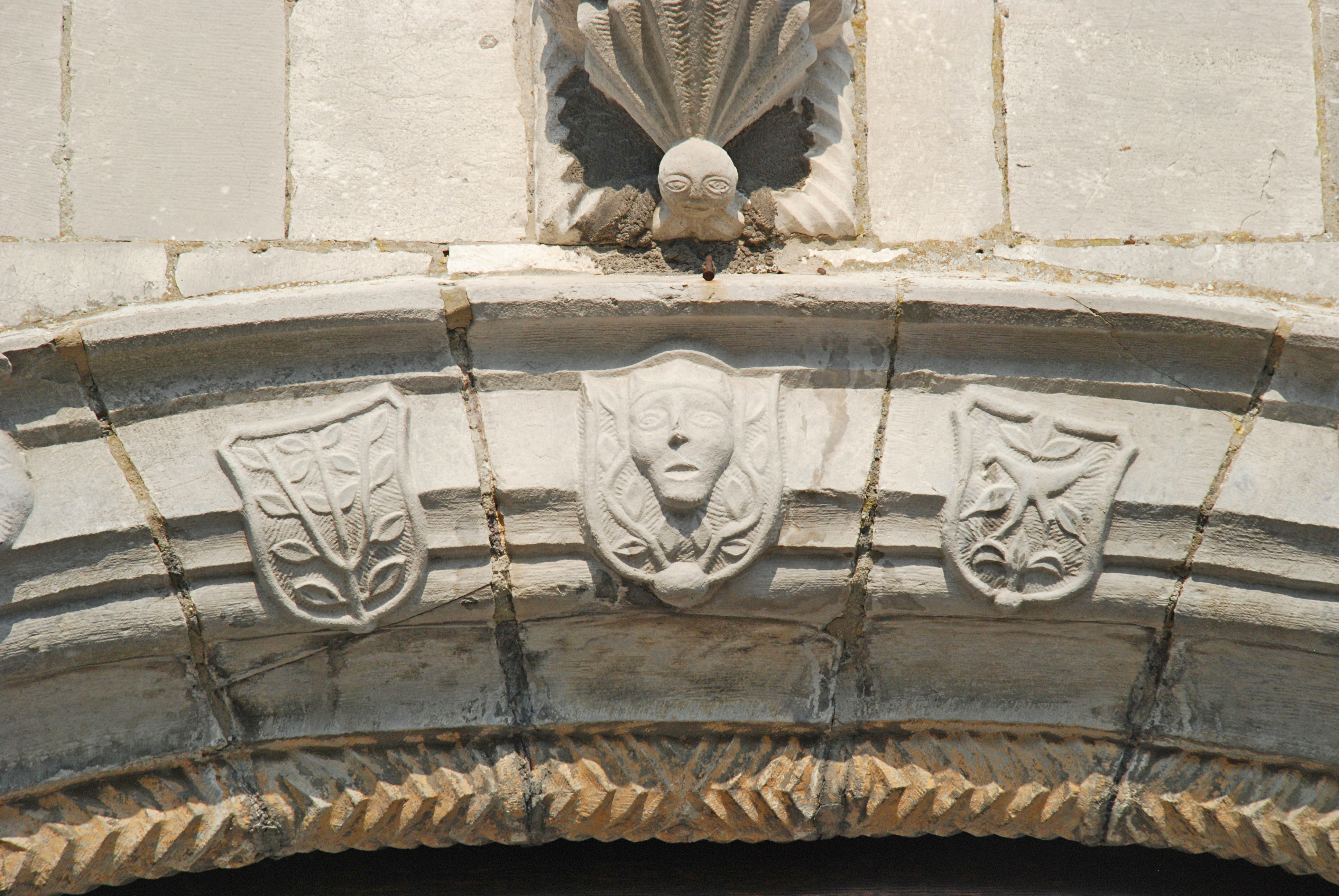 Belgique - Province de Namur - Andenne - Église Saint-Étienne de Seilles